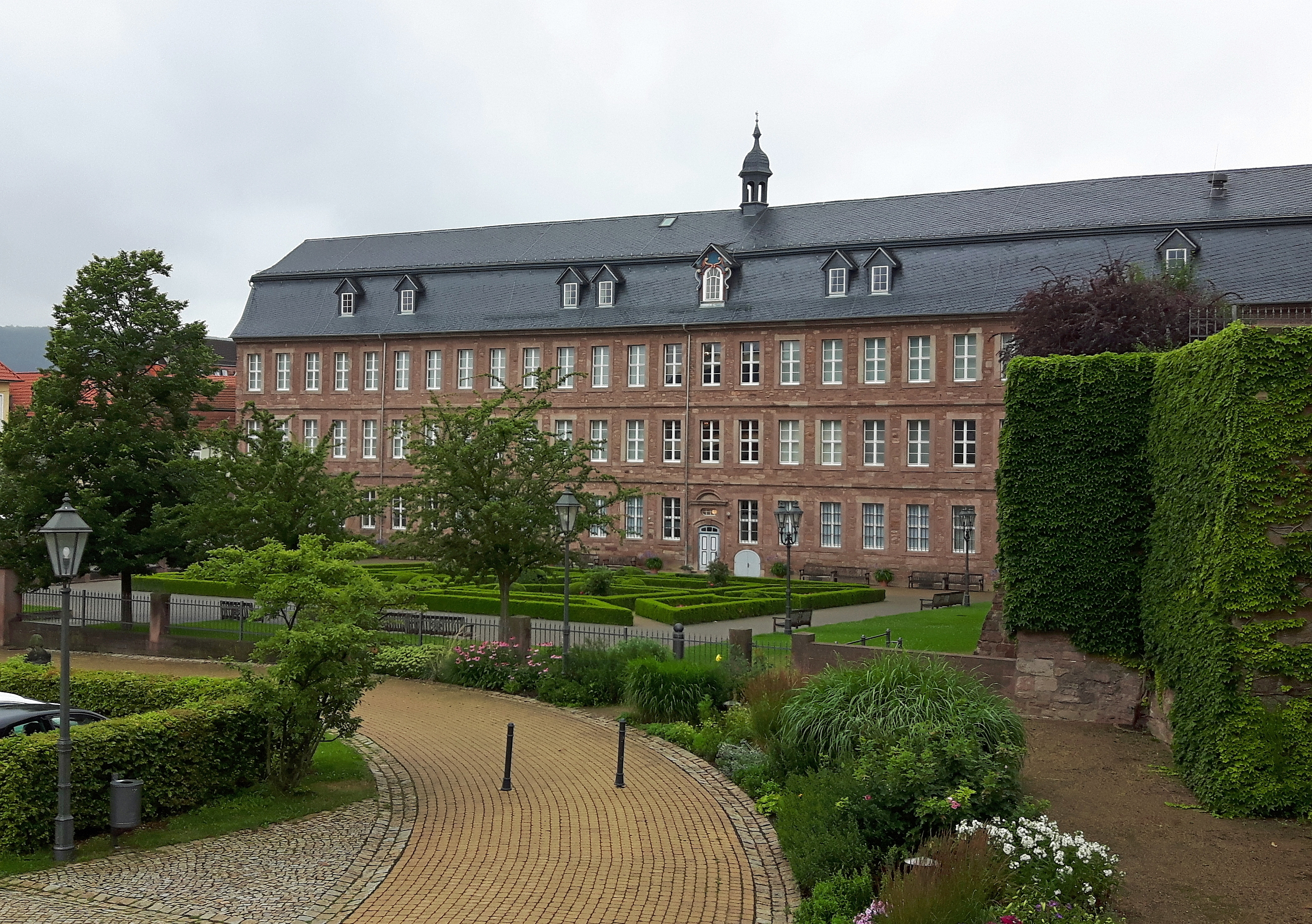 Heiligenstadt, denkmalgeschütztes Eichsfelder Heimatmuseum, ehem. Jesuitenkolleg